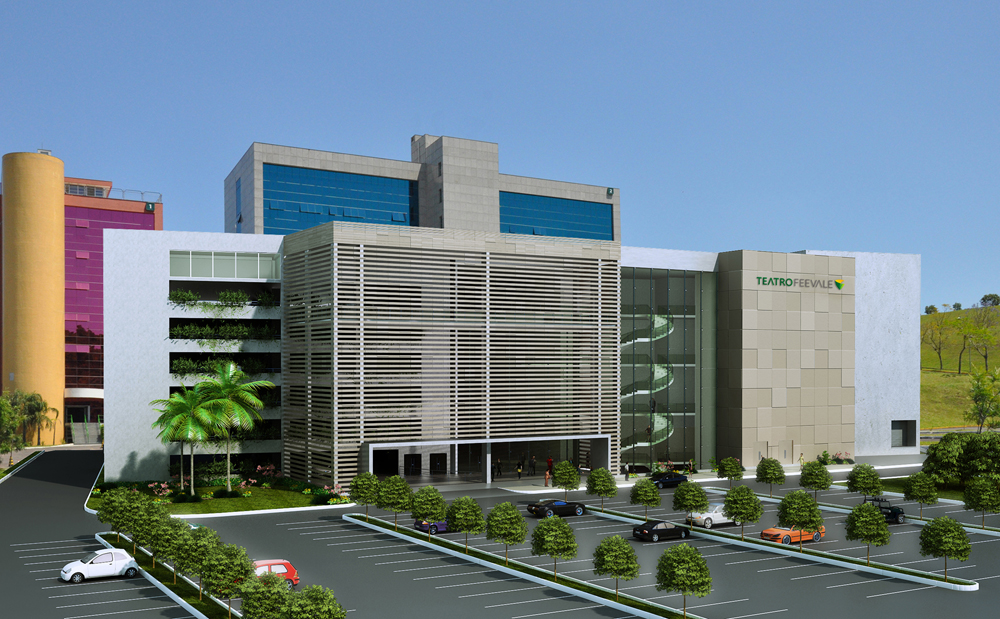 A cidade de Novo Hamburgo ganhou um novo espaço cultural e multiuso: o Teatro Feevale, localizado no Campus II da universidade (ERS-239, 2755). O empreendimento iniciou sua vida cultural dia 20 de setembro, com a apresentação do tenor de reconhecimento internacional Jose Carreras. O teatro é administrado em parceria com a Opus Promoções, produtora gaúcha com know how em gerenciar casas de espetáculos dentro e fora do Estado. O local atende as necessidades da instituição de ensino, que tem um ambiente próprio para realizar formaturas e outros eventos acadêmicos e ainda serve de cenário para diversas produções artísticas, colocando a região do Vale do Sinos no roteiro de espetáculos nacionais e internacionais. O espaço cultural tem cerca de 10.500 m² e pode receber cerca de 1.800 espectadores. O palco, em estilo italiano, está projetado com área total de mais de 500m², altura de 19m, largura de 36m e profundidade de 15m. A casa priorizou a utilização dos mais modernos mecanismos cênicos, desde os equipamentos de bastidores, da iluminação, acústica, aos elementos para o conforto, segurança e acessibilidade ao público. Possui em suas dependências cinco camarotes, com 27 poltronas cada, e um backstage que comporta oito camarins, dois deles com capacidade para até 30 pessoas.